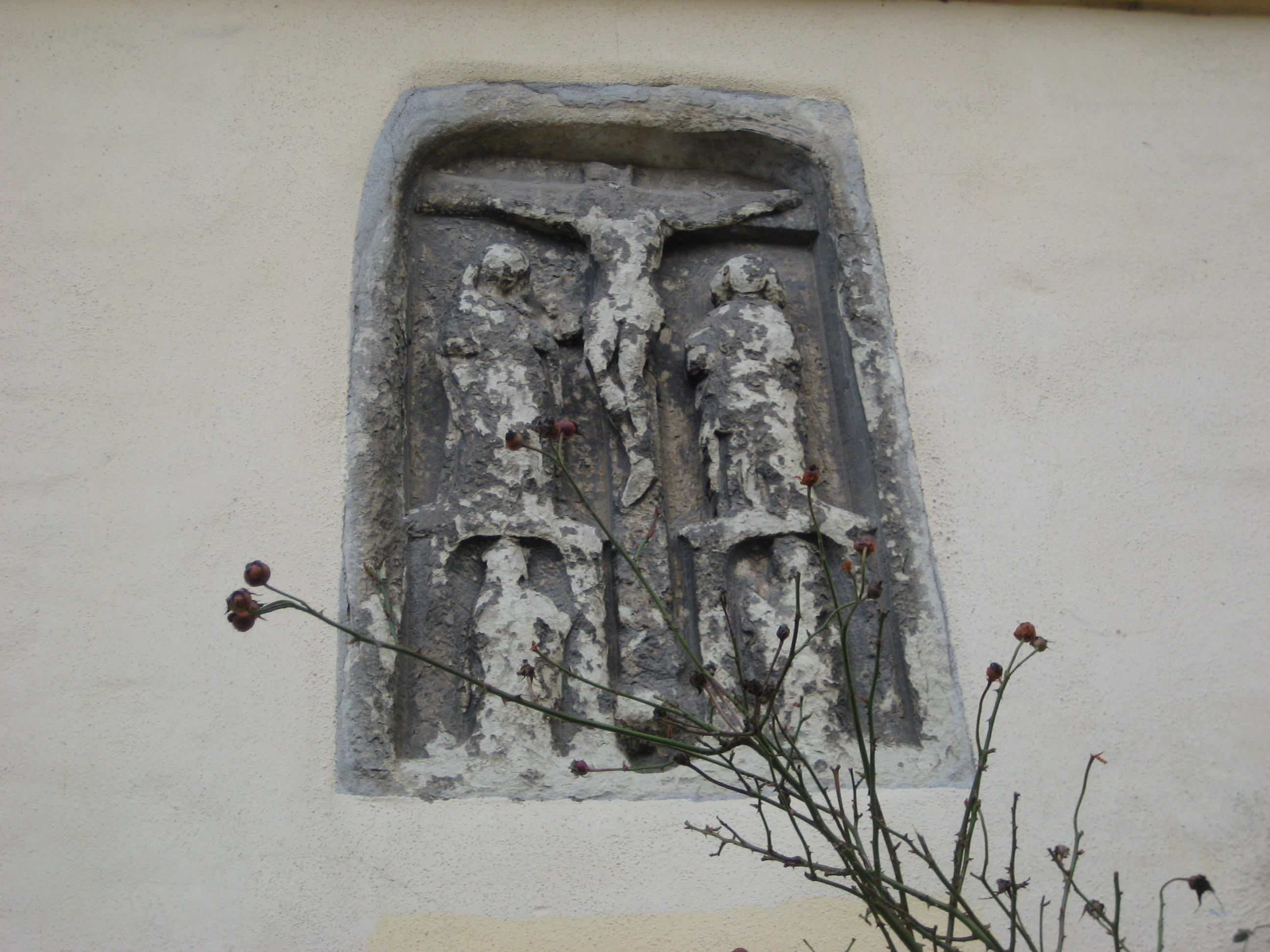 Relief am Chor von St. Katharinen